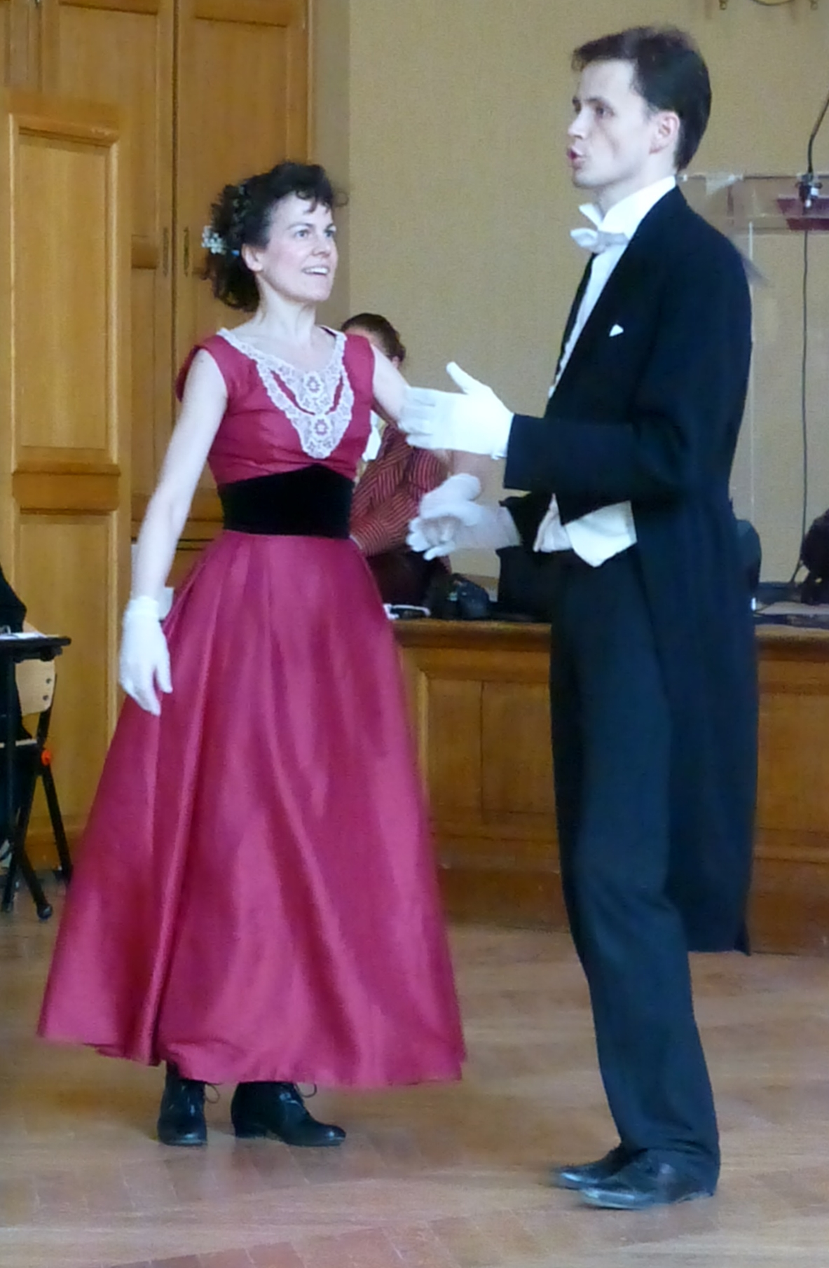 Laurence Boudet-Garril et Eric Burté lors du Premier Championnat de France de Danse historique